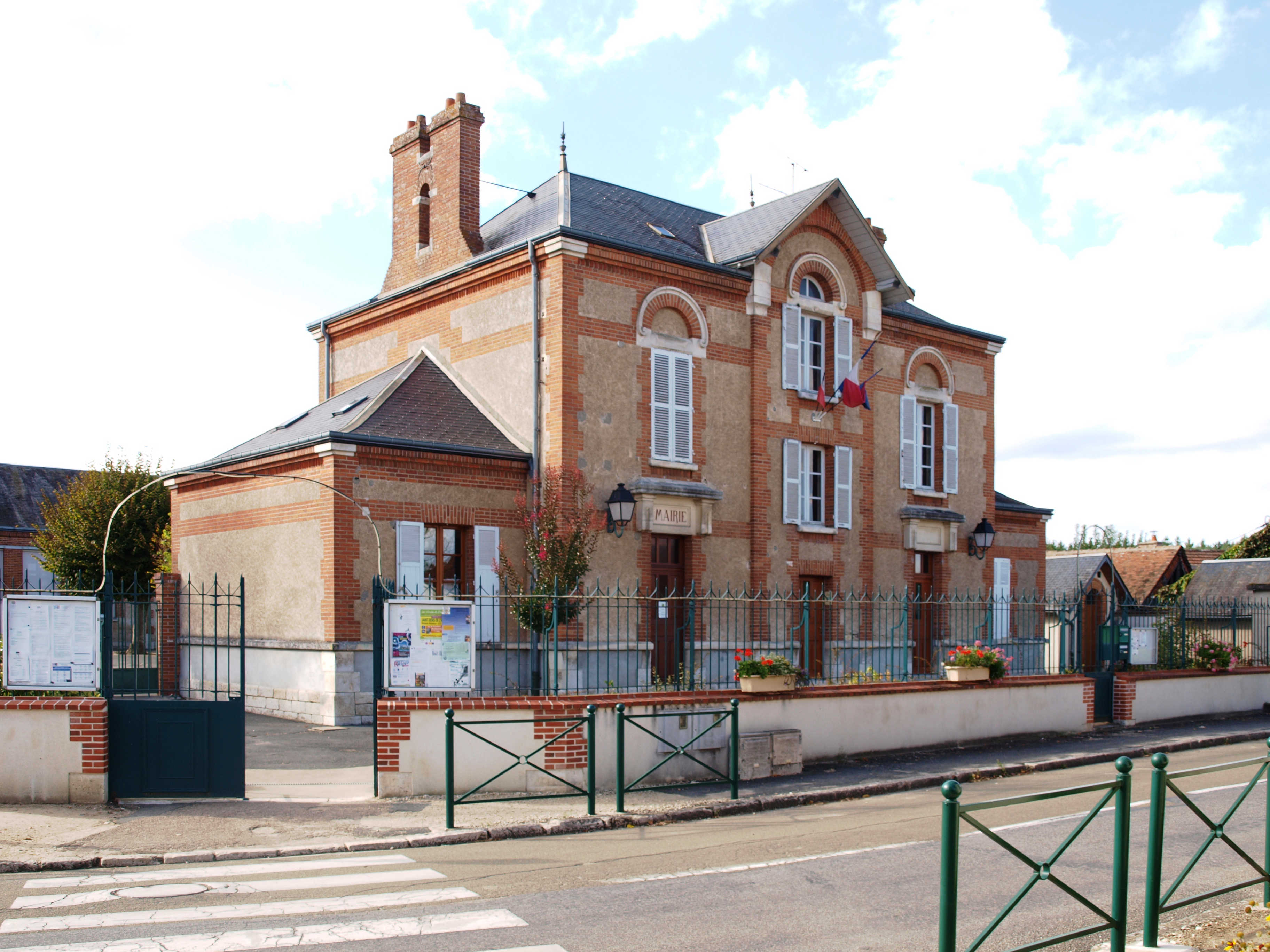 Sury-aux-Bois (Loiret, France) ; mairie.